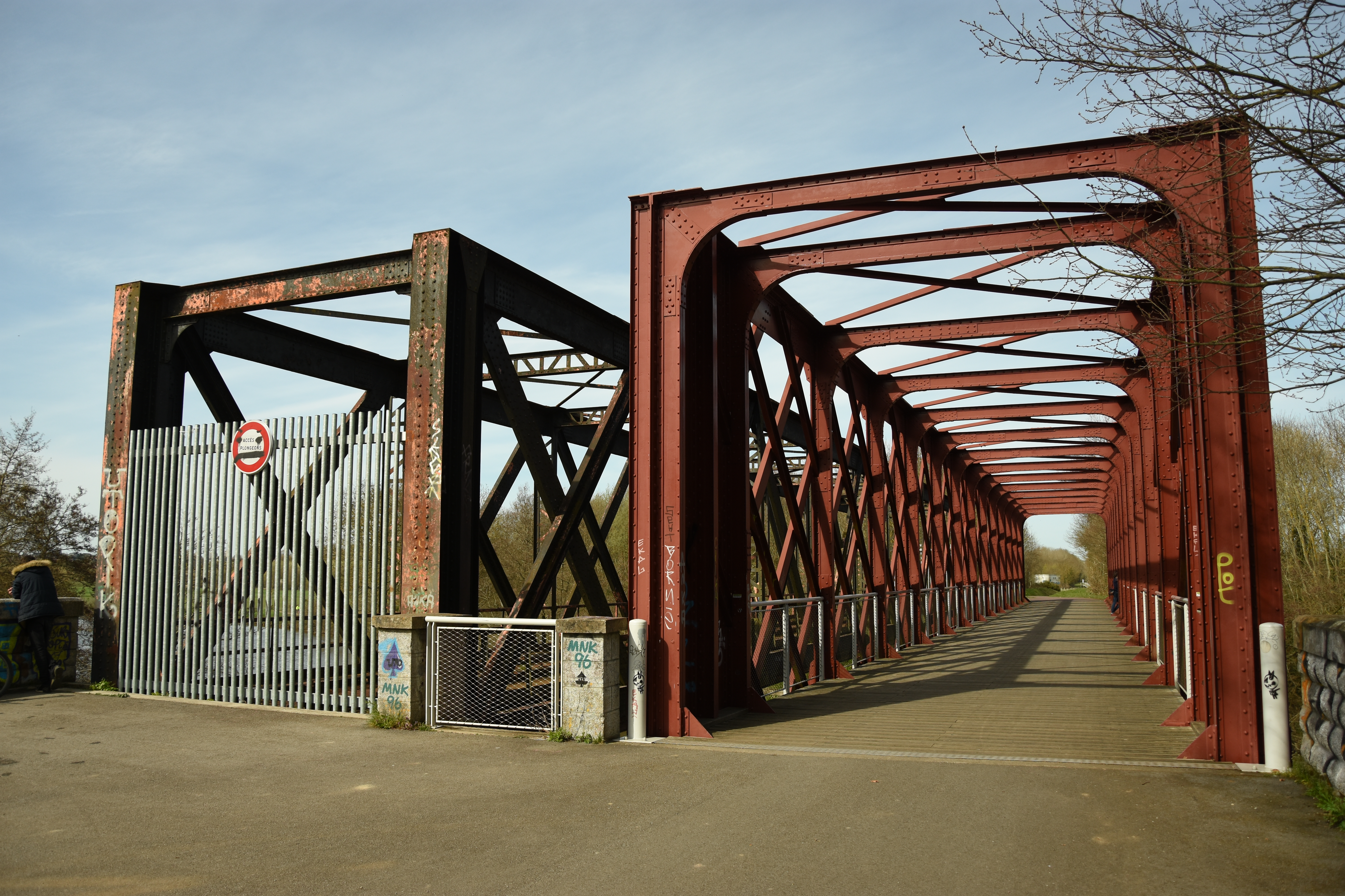 Pont ferroviaire de Fleury-sur-Orne sur l'ancienne ligne de Caen à Flers